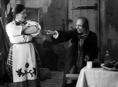 Кадр из фильма "Ночь перед Рождеством" (1913)